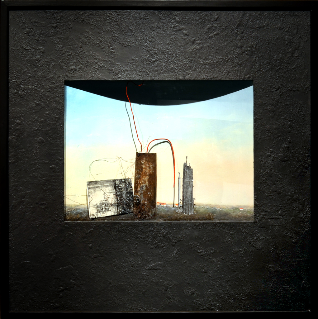 Bedřich Dlouhý, Jak jsme začínali (2015), kombinovaná technika